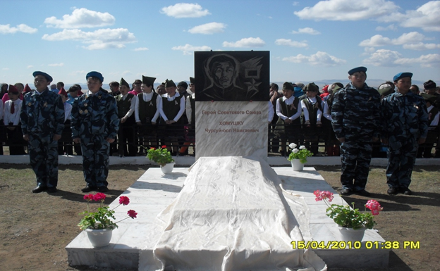 Неподалеку от села Берт-Даг, на возвышении есть отдельно стоящее захоронение - могила Героя Советского Союза Ч.Н. Хомушку. По Постановлению Правительства Республики Тыва от 12 мая 1997 г. № 190 «О дополнении к Государственному списку памятников истории и культуры Республики Тыва» является памятником истории и культуры Регионального значения.